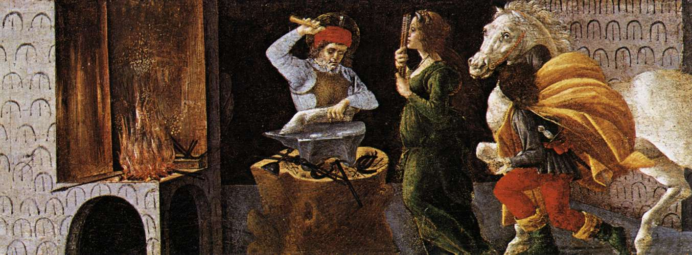 BOTTICELLI, Sandro Miracle of St Eligius Tempera on panel, 21 x 269 cm (entire predella) Galleria degli Uffizi, Florence